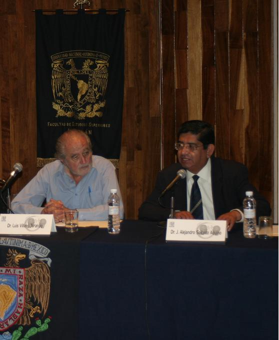 Luis Vlloro Toranzo y J. Alejandro Salcedo Aquino en el coloquio "El lenguaje y el silencio en Occidente" organizado por la División de Humanidades de la Facultad de Estudios Superiores Acatlán de la Universidad Nacional Autónoma de México en el primer semestre de 2006.